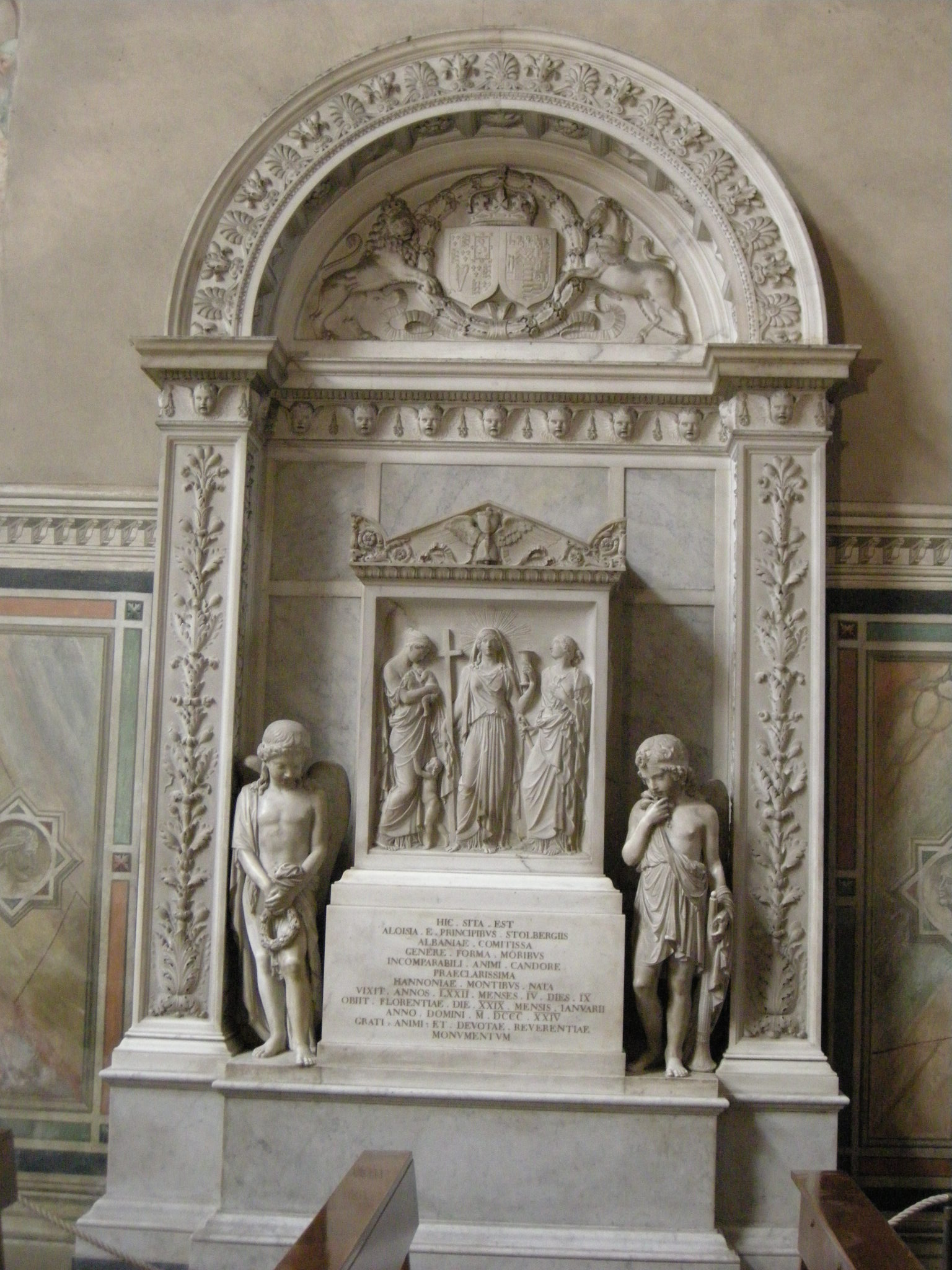 Cappella castellani, monum. a luisa stolberg (m. 1824) di luigi giovannozzi e emilio santarelli su dis. di charles percier.JPG